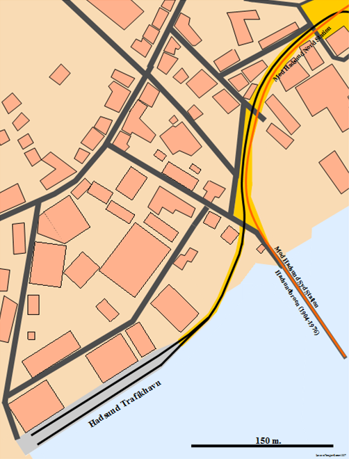 Kort over Hadsund Havnebane. Den orange streg er Randers-Hadsund Jernbane, den sorte streg er Hadsund Havnebane, det gule er grus, det blå er vand, det mørke grå er veje, det lyse grå er Hadsund Trafikhavn den mørke lyserøde er bygninger, den ledt lyser lyserøde er er byzone